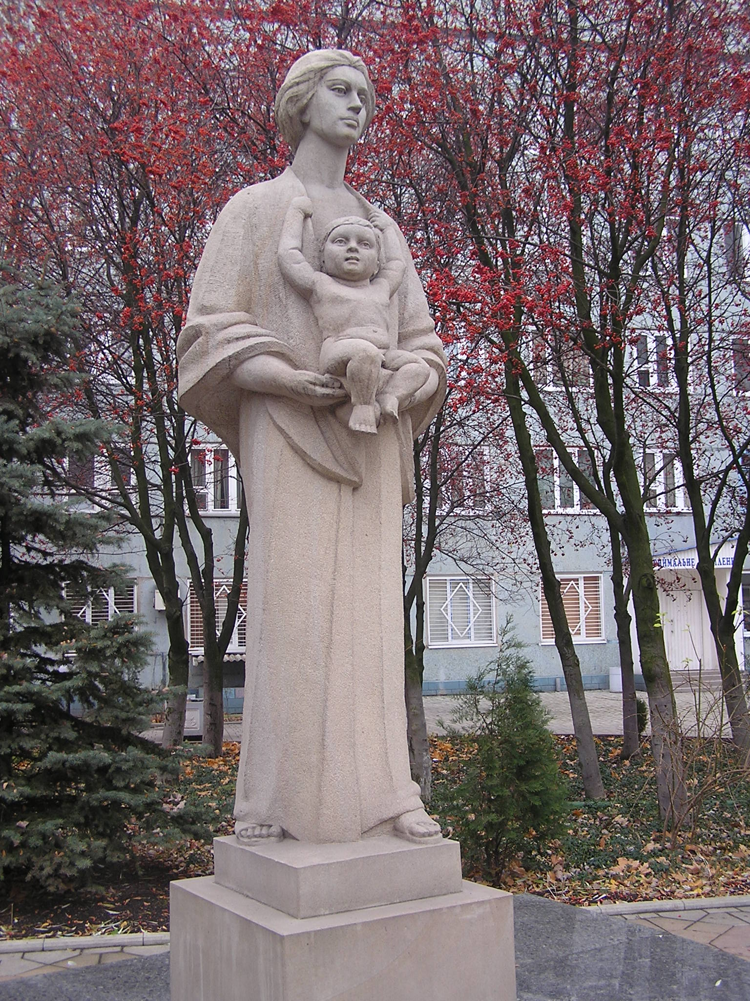 Донецк. Памятник матери